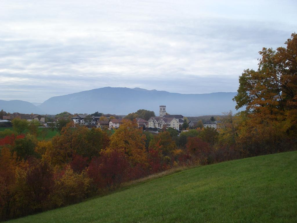 Viry département 74